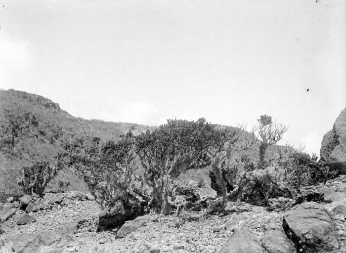 Negatief. Met Usnea begroeide Vaccinium varingiaefolium bij de top van de vulkaan Arjuno